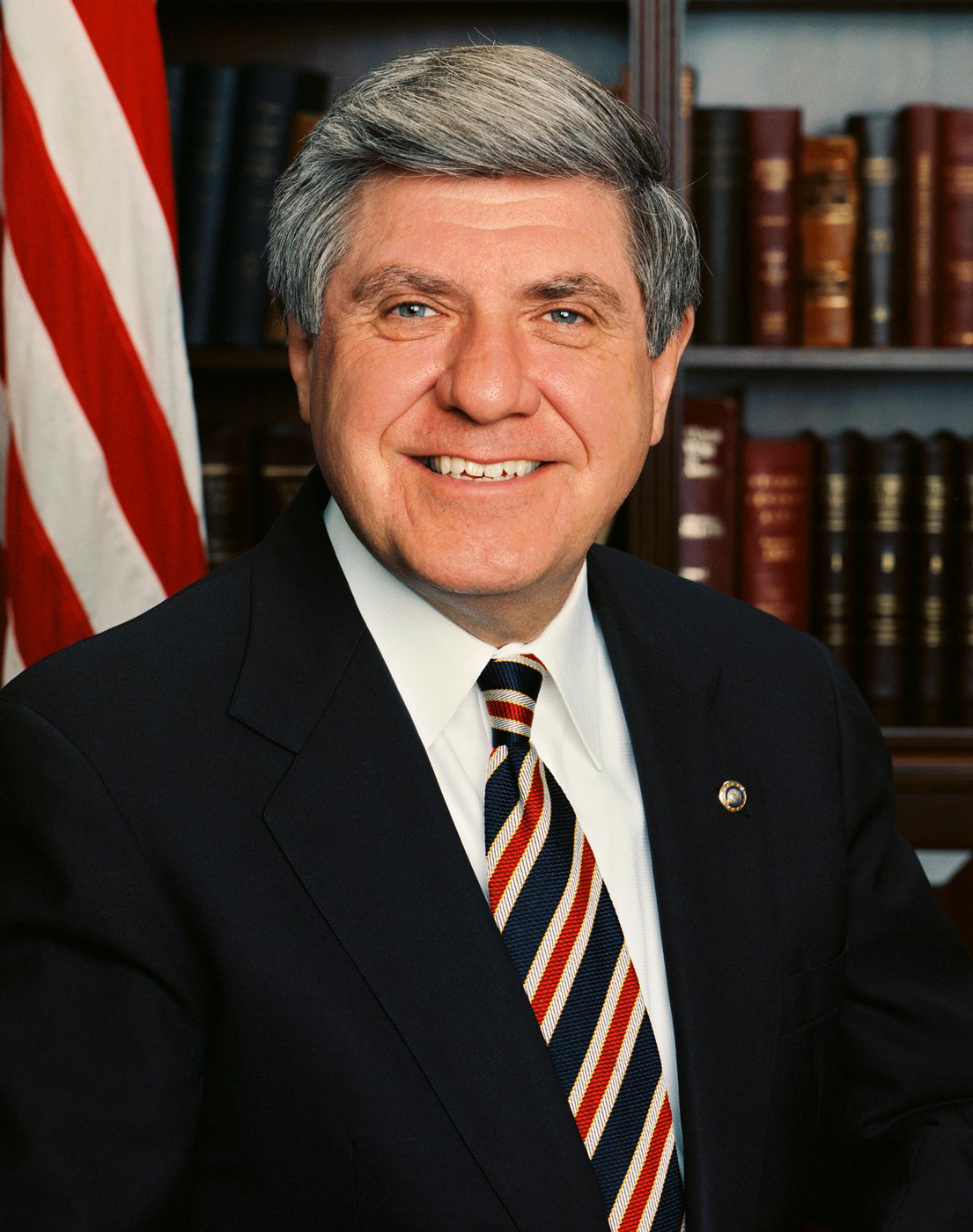 Ben Nelson, U.S. Senator from Nebraska.